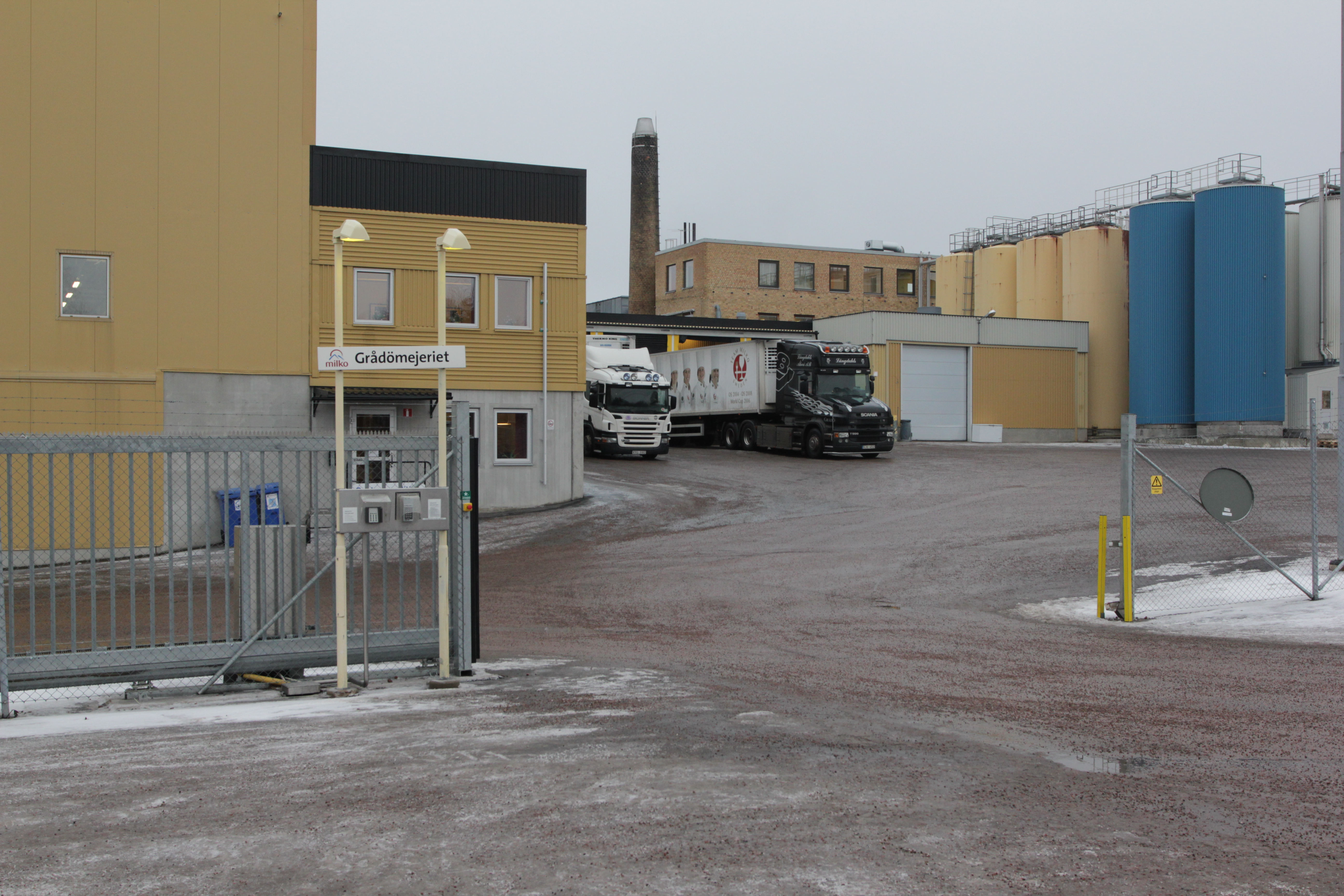 Grådö mejeri, Hedemora kommun.